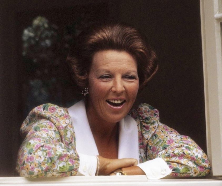 Foto uurtje Koninklijke Familie op Huis ten Bosch ; Koningin Beatrix in venster